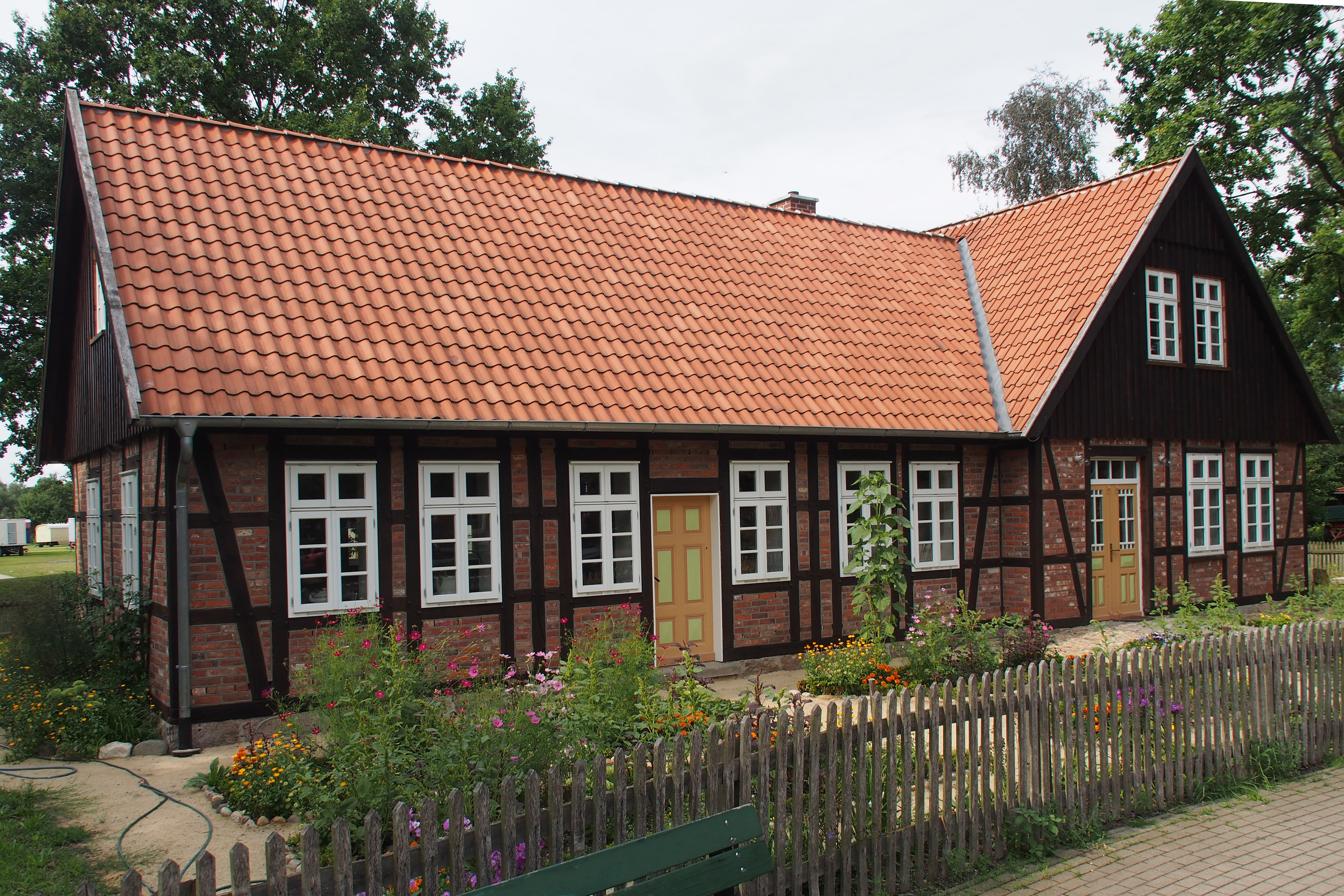 Auf dem Gelände des Heimatmuseums Hermannsburg wieder aufgebautes Häuslingshaus, ehemals in Baven (Landkrs. Celle)